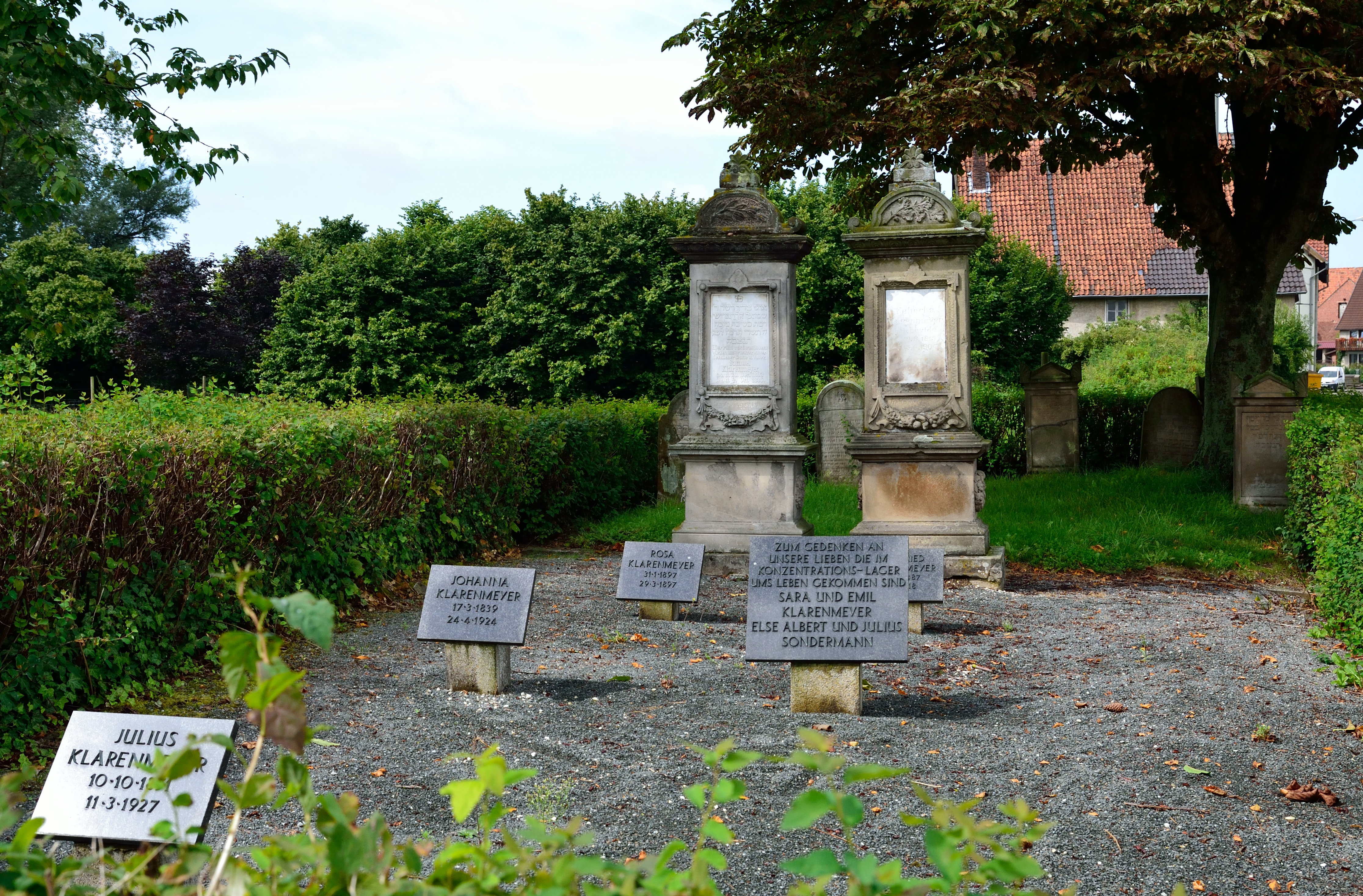 This is a photograph of an architectural monument. .06 Jüdischer Friedhof Belle